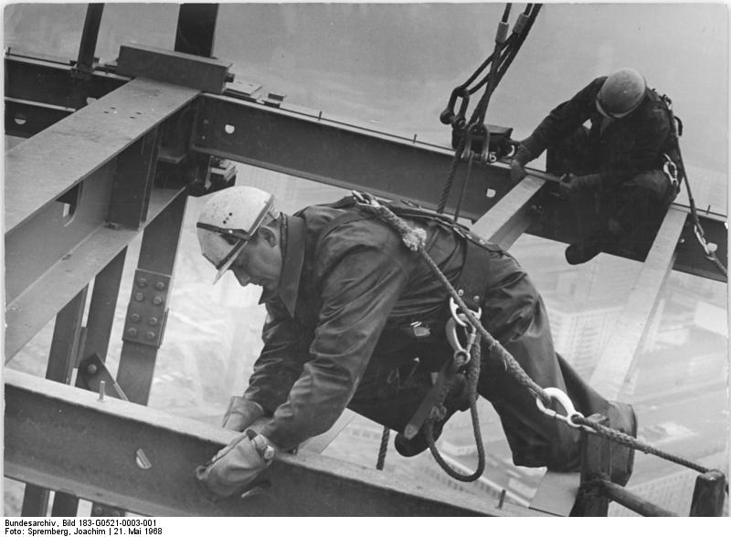 Zentralbild Spremberg 21.5.1968 Berlin: Luftakrobaten des 20. Jahrhunderts Das Zentrum der Hauptstadt liegt über 200 Meter tief unter ihnen - aber auch in schwindeliger Höhe, bei schwierigsten Arbeitsbedingungen sitzt jeder Handgriff sicher. Erwin Günther (vorn) und Günter Schadow vom VEB Industriemontagen Leipzig montieren Teile der Stahlskelett-Konstruktion für die Kugel des Fernsehturmes. Bis jetzt sind ca. 350 Tonnen Stahl mit dem Turmschaft verbunden.